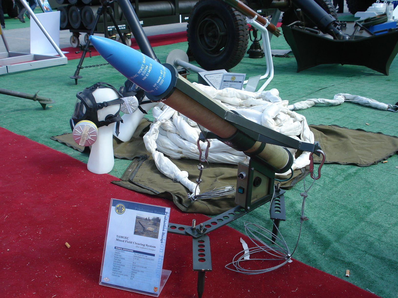 IDEF '07 Savunma Fuarı'nda çekildi. Tamgec. 23 Mayıs 2007